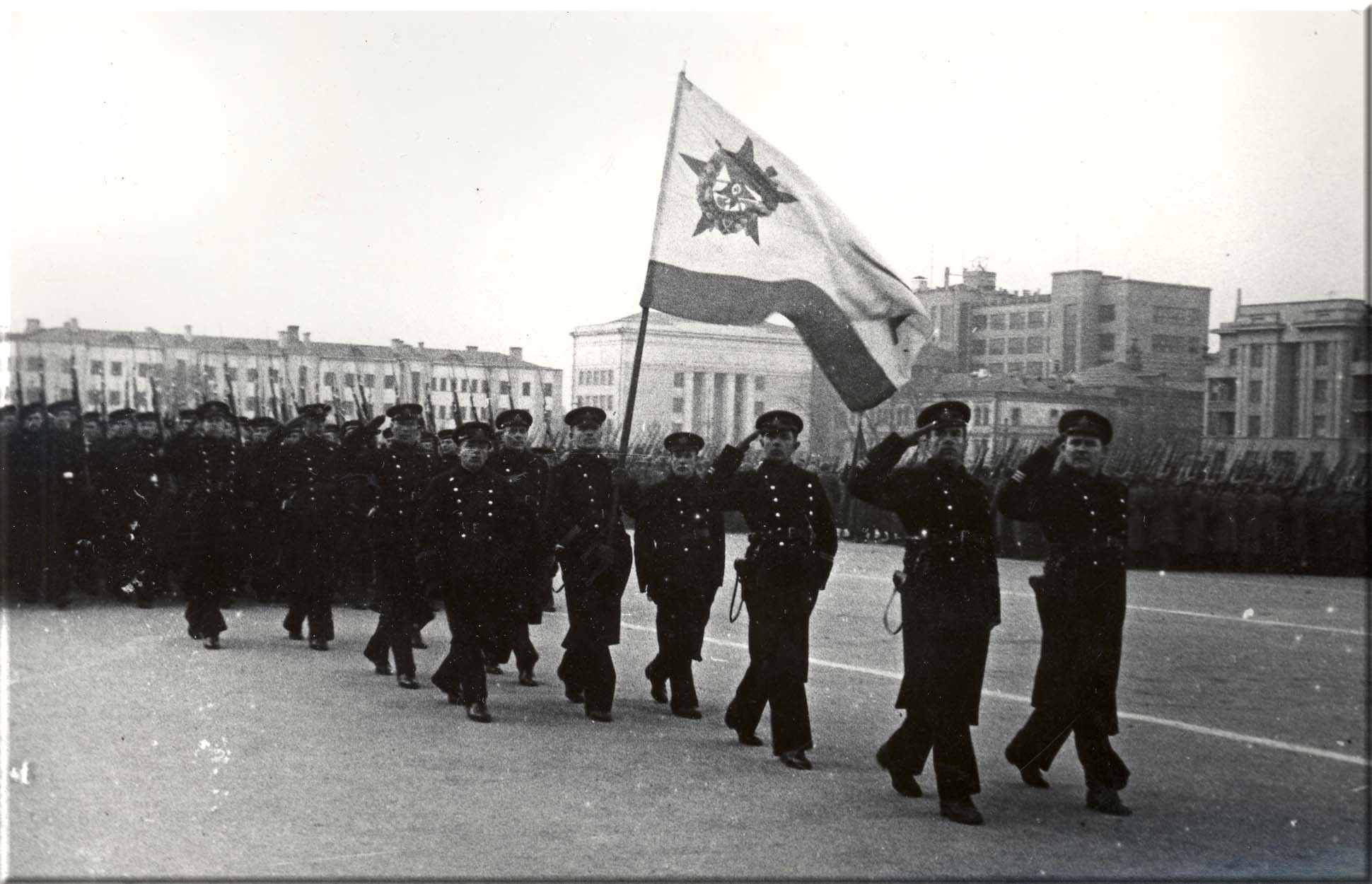 Моряки Амурской флотилии. Военный парад в Куйбышеве 7 ноября 1941 г.